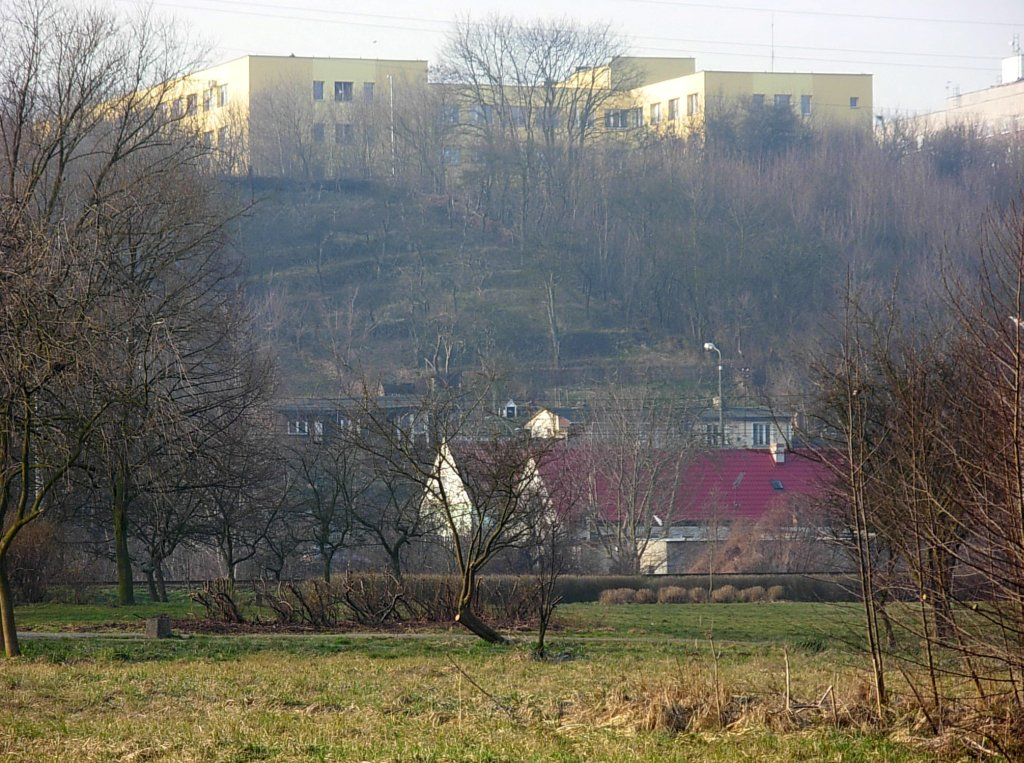 Park Centralny w Bydgoszczy